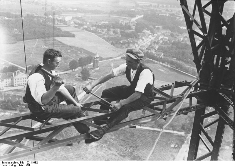 Zwischen Himmel und Erde! Reparaturarbeiten in 240 m Höhe am Grossfunkturm in Königswusterhausen. Tief unten Königswusterhausen.